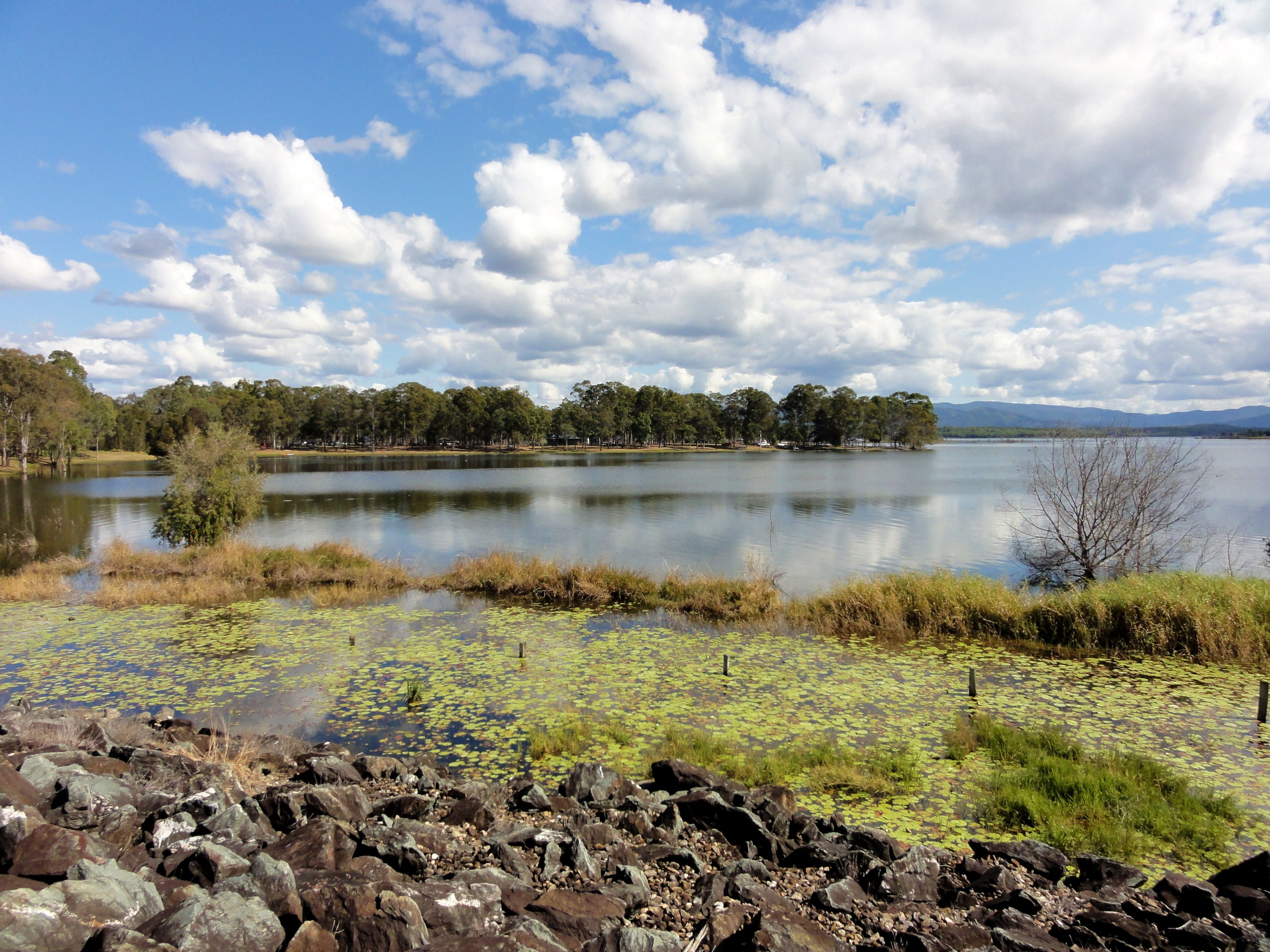 Lake Samsonvale